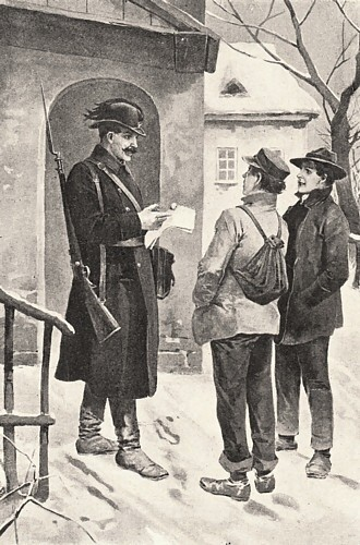 Ilustrace Věnceslava Černého k románu Karla Maye Vánocen z roku 1909